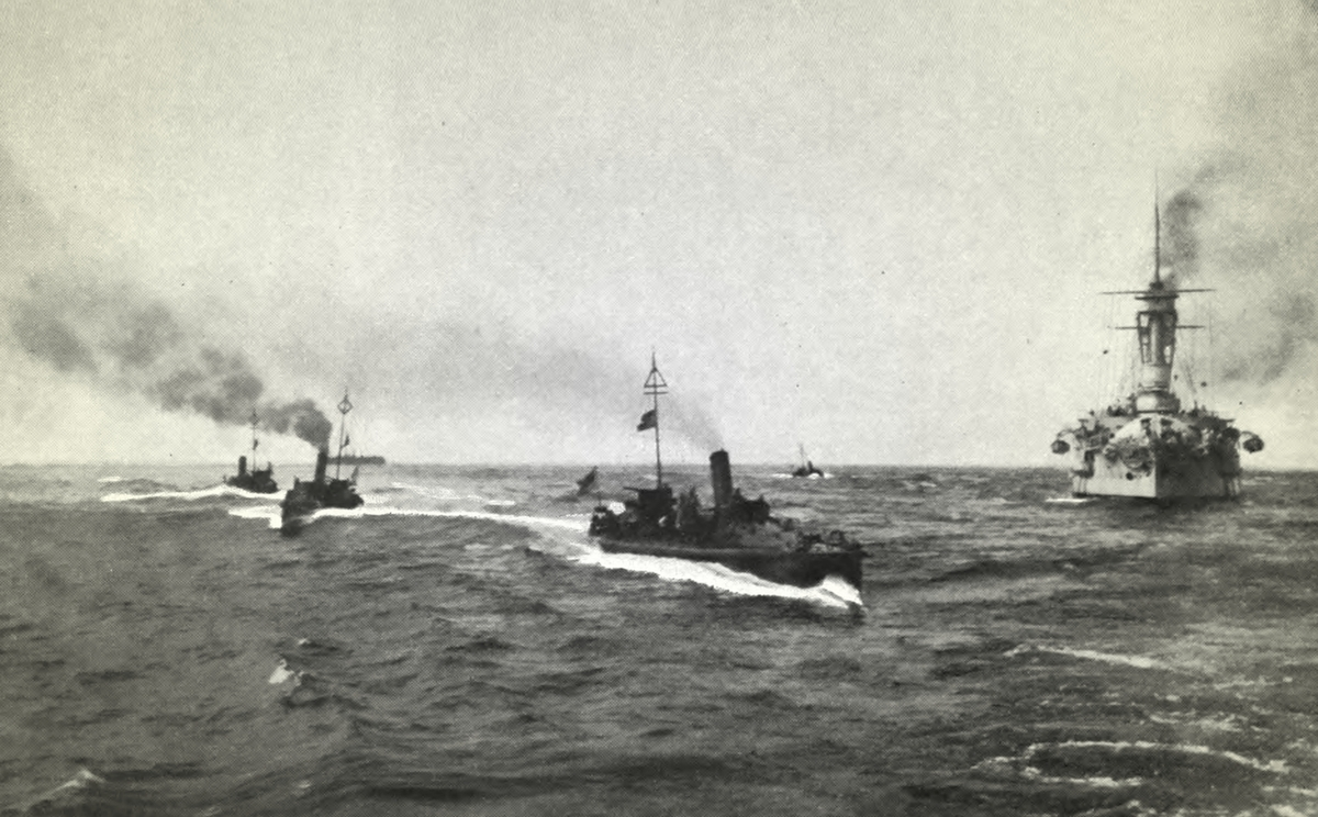 Schichau Torpedoboote durchbrechen während eines Manövers die Linie eines Kreuzergeschwaders.